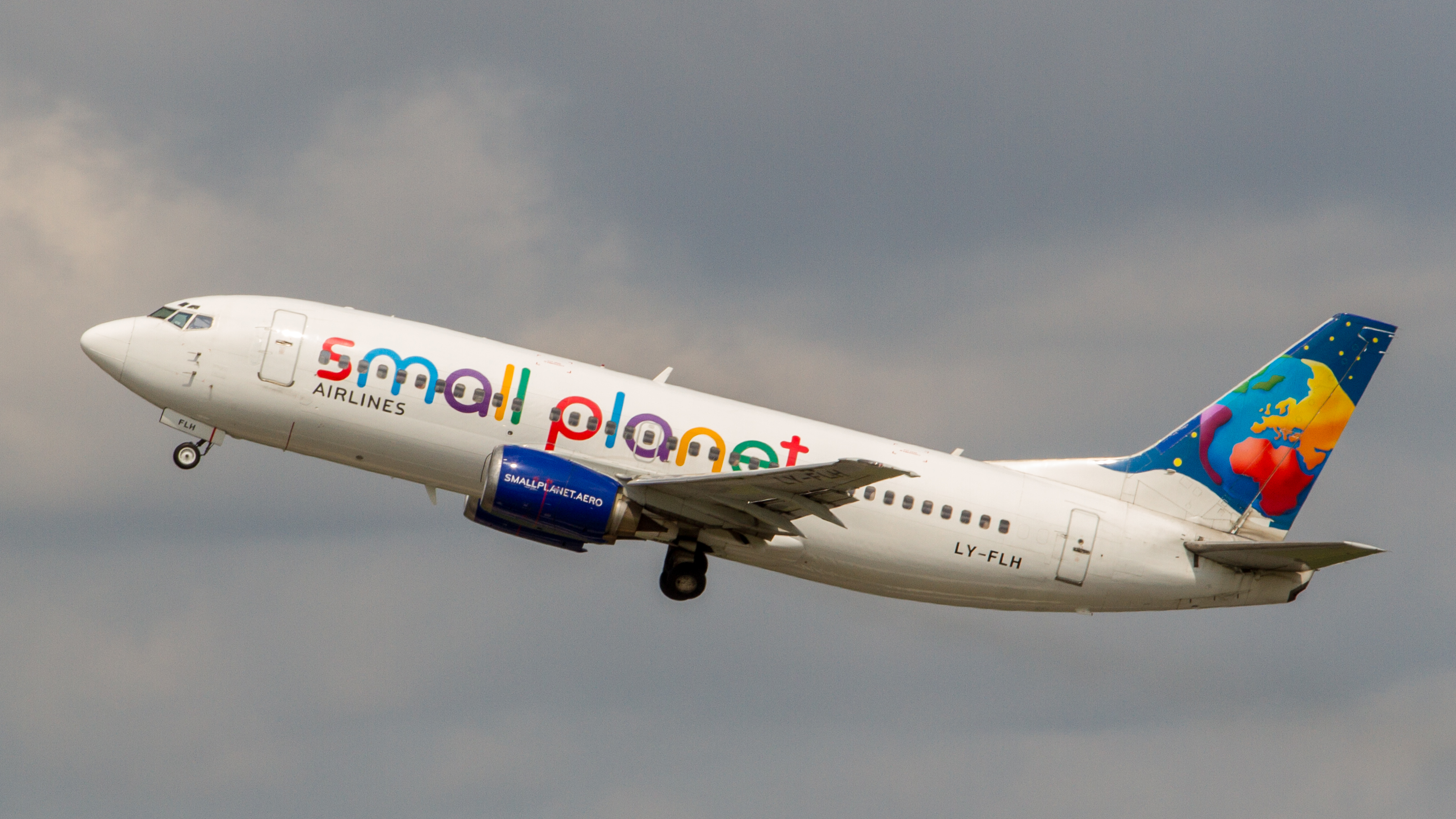 Manchester 26.06.13.